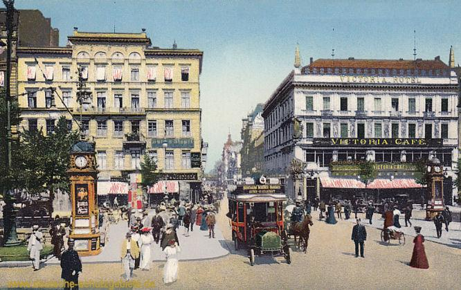 Ansicht des Victoria-Hotels und des Victoria-Cafés an der Kreuzung der Straße Unter den Linden und der Friedrichstraße in Berlin, um 1910.